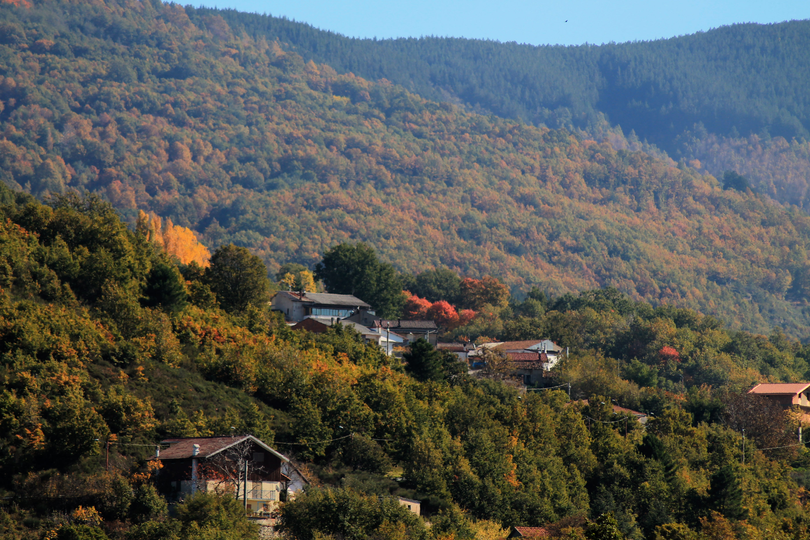 Autunno a Luzzi